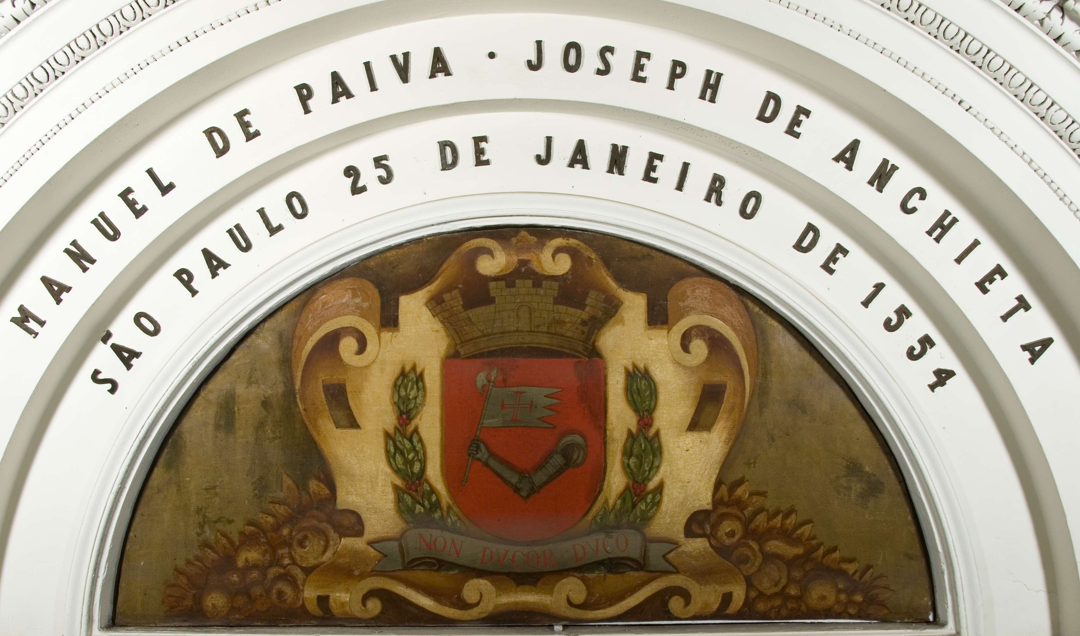 Obra que integra o acervo do Museu Paulista da USP. Coleção José Wasth Rodrigues - CJWR